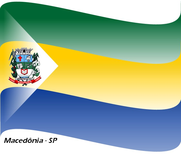 Bandeira do município de Macedônia - SP - Brasil.